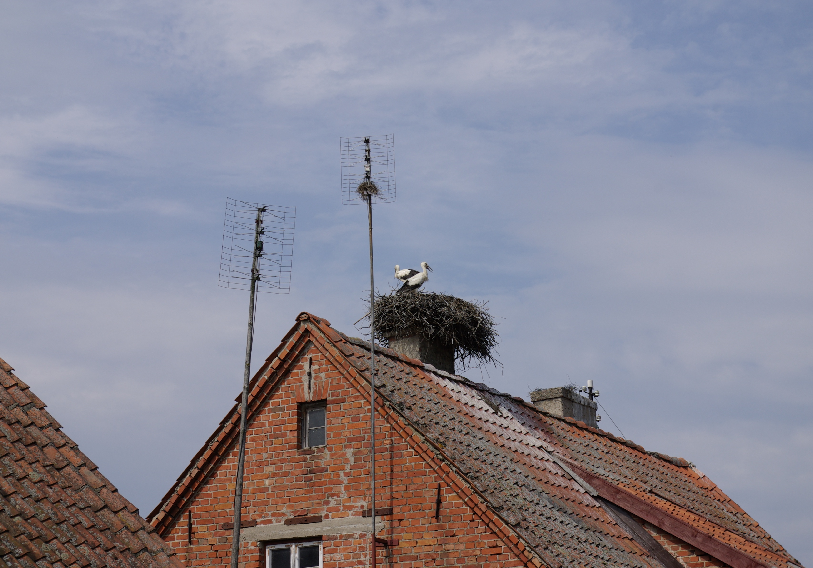 Zabrost Wielki; Bocian biały